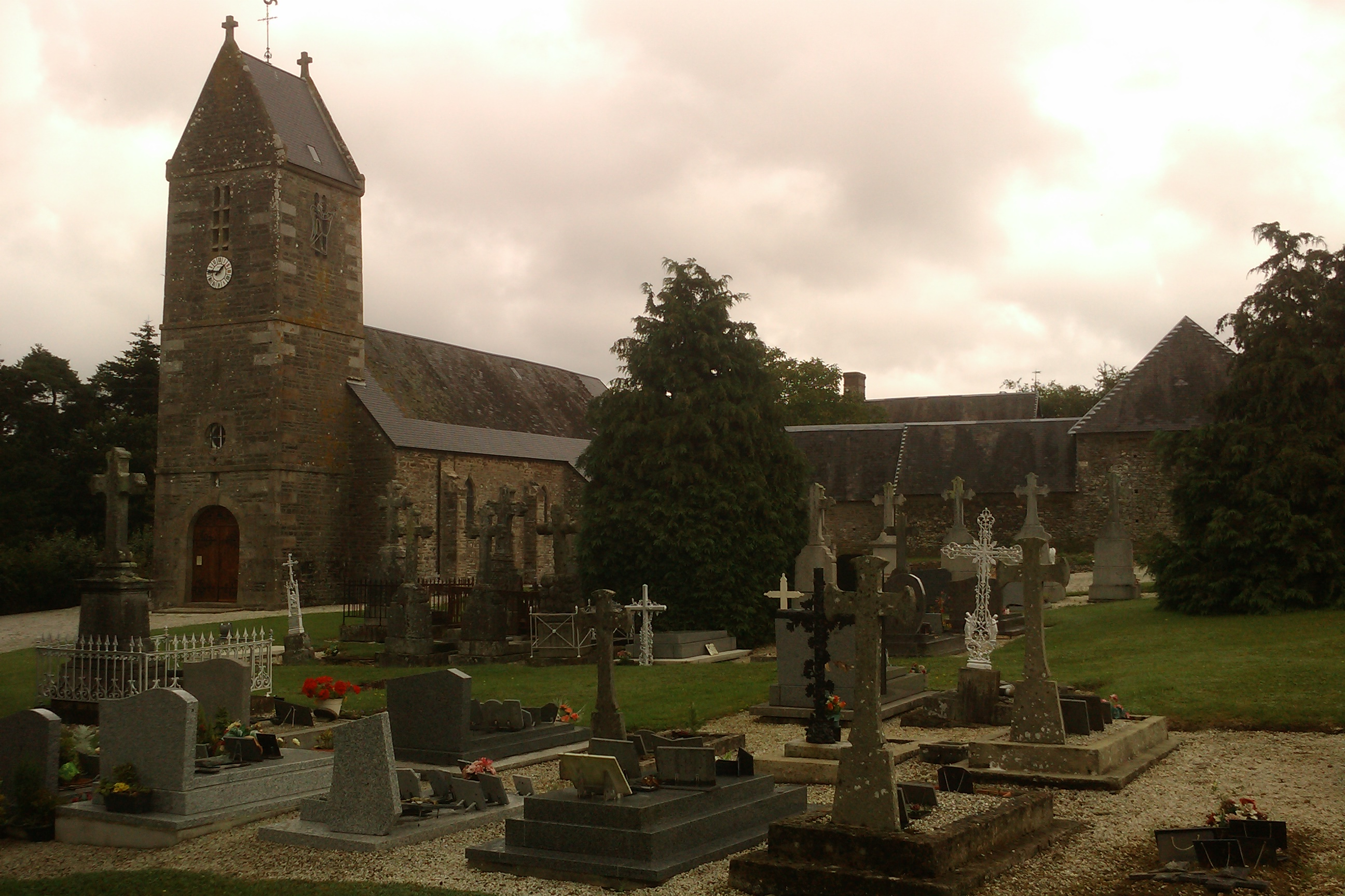 Église de Beuvrigny